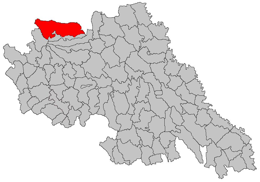 Categorie:Hărţi ale judeţului Iaşi